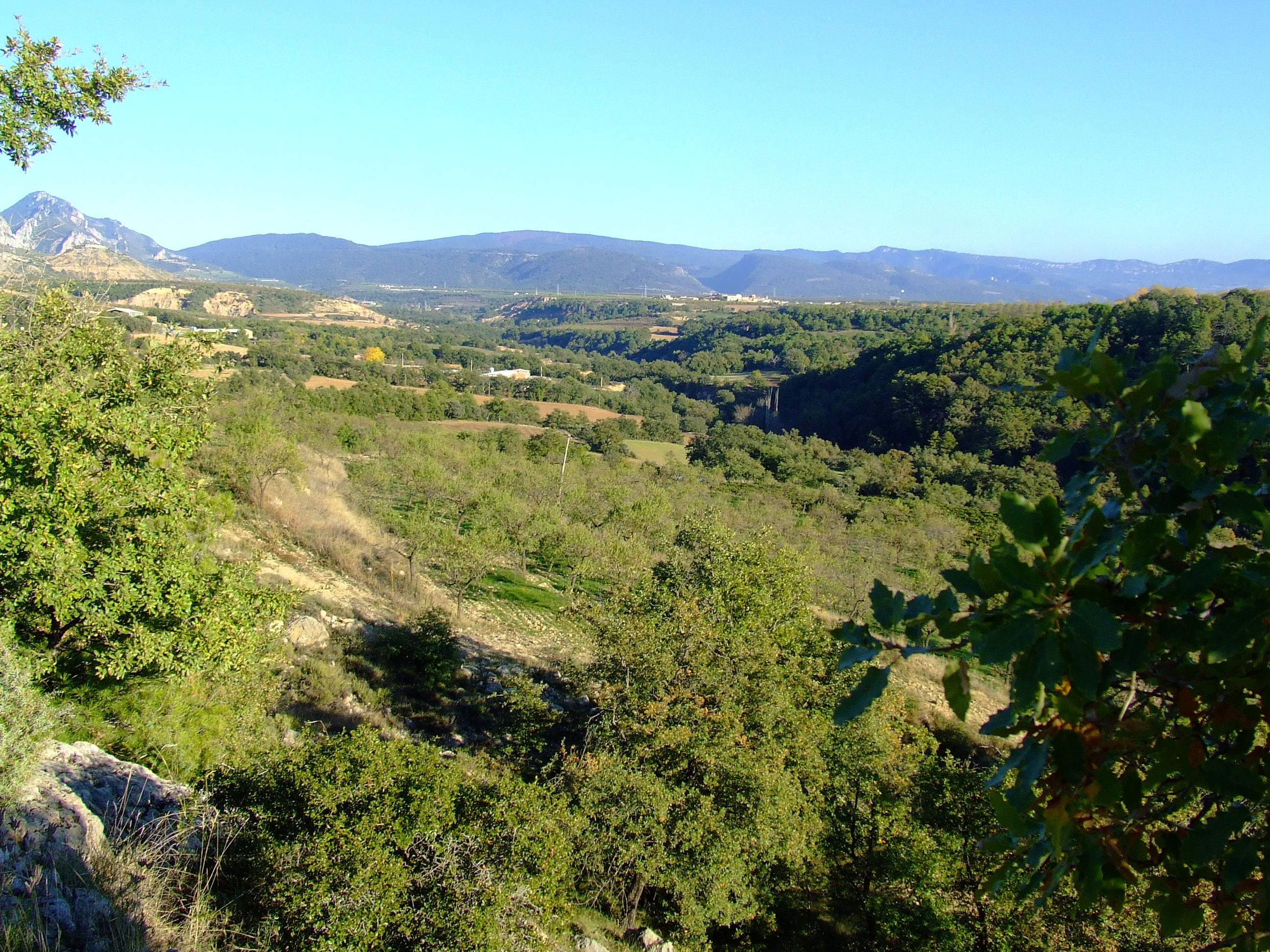 El riu d'Abella, entre Basturs i Sant Romà d'Abella (Isona i Conca Dellà, Pallars Jussà)